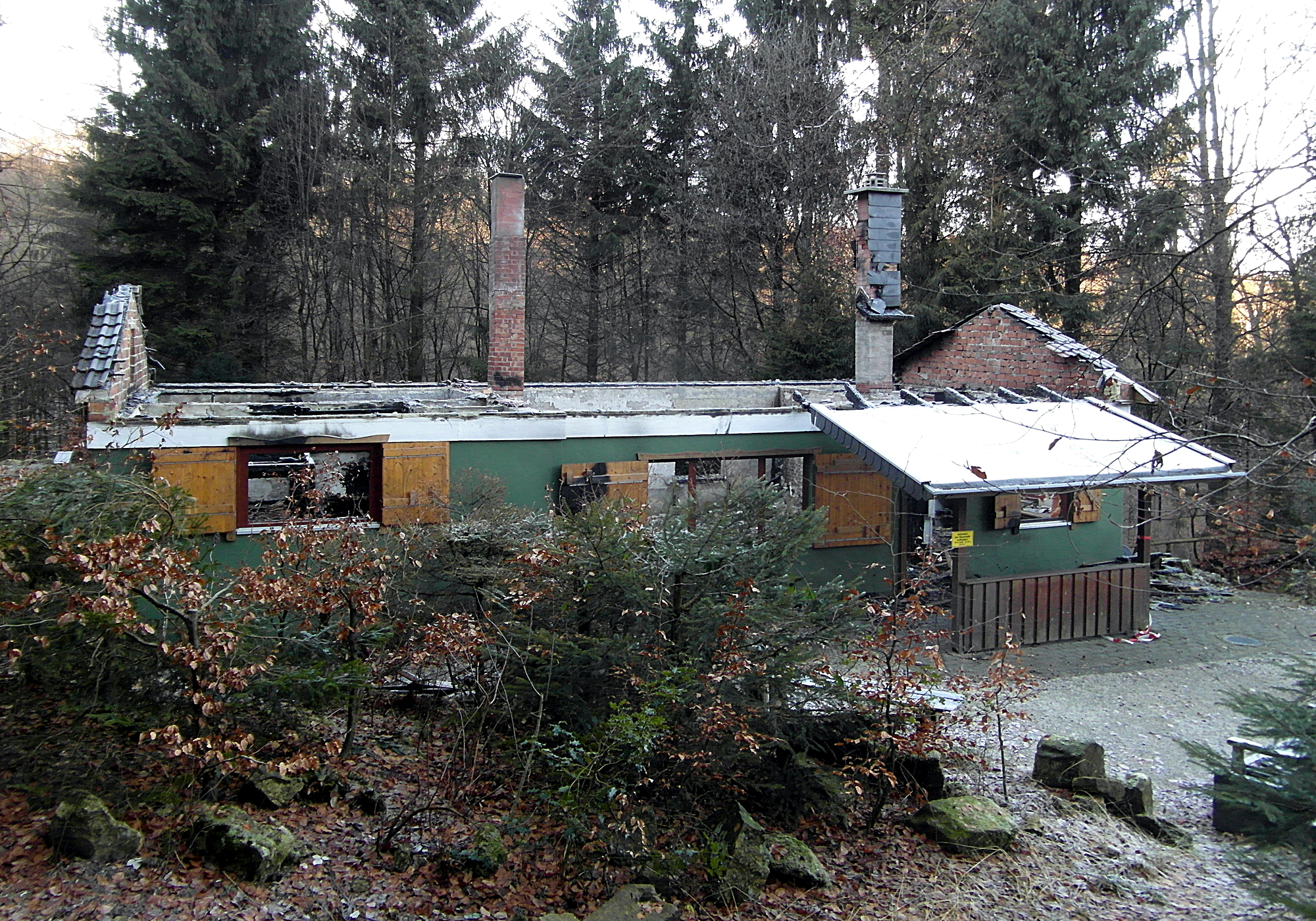 Schleifbachhütte